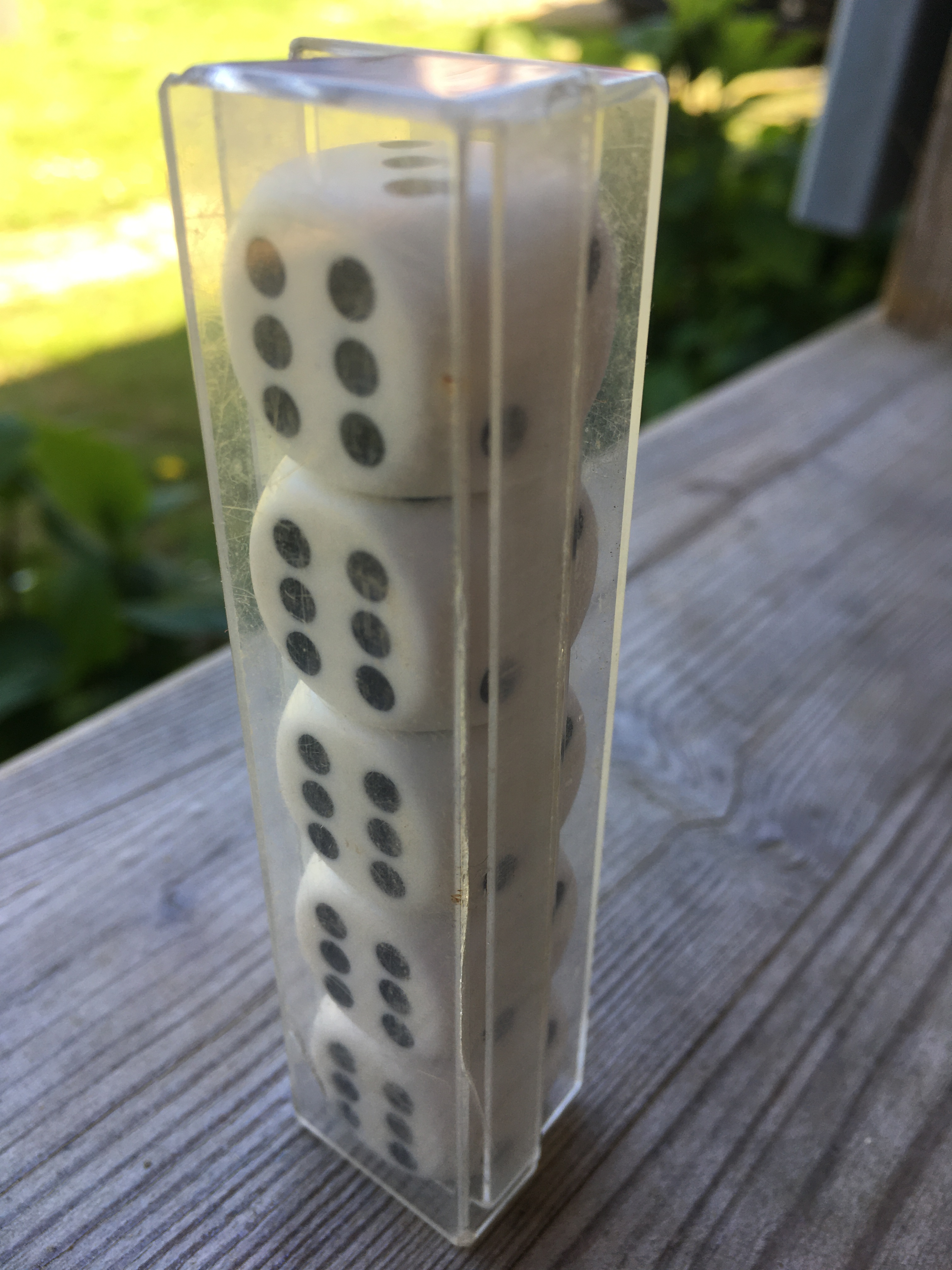 5 dats de sheis caras